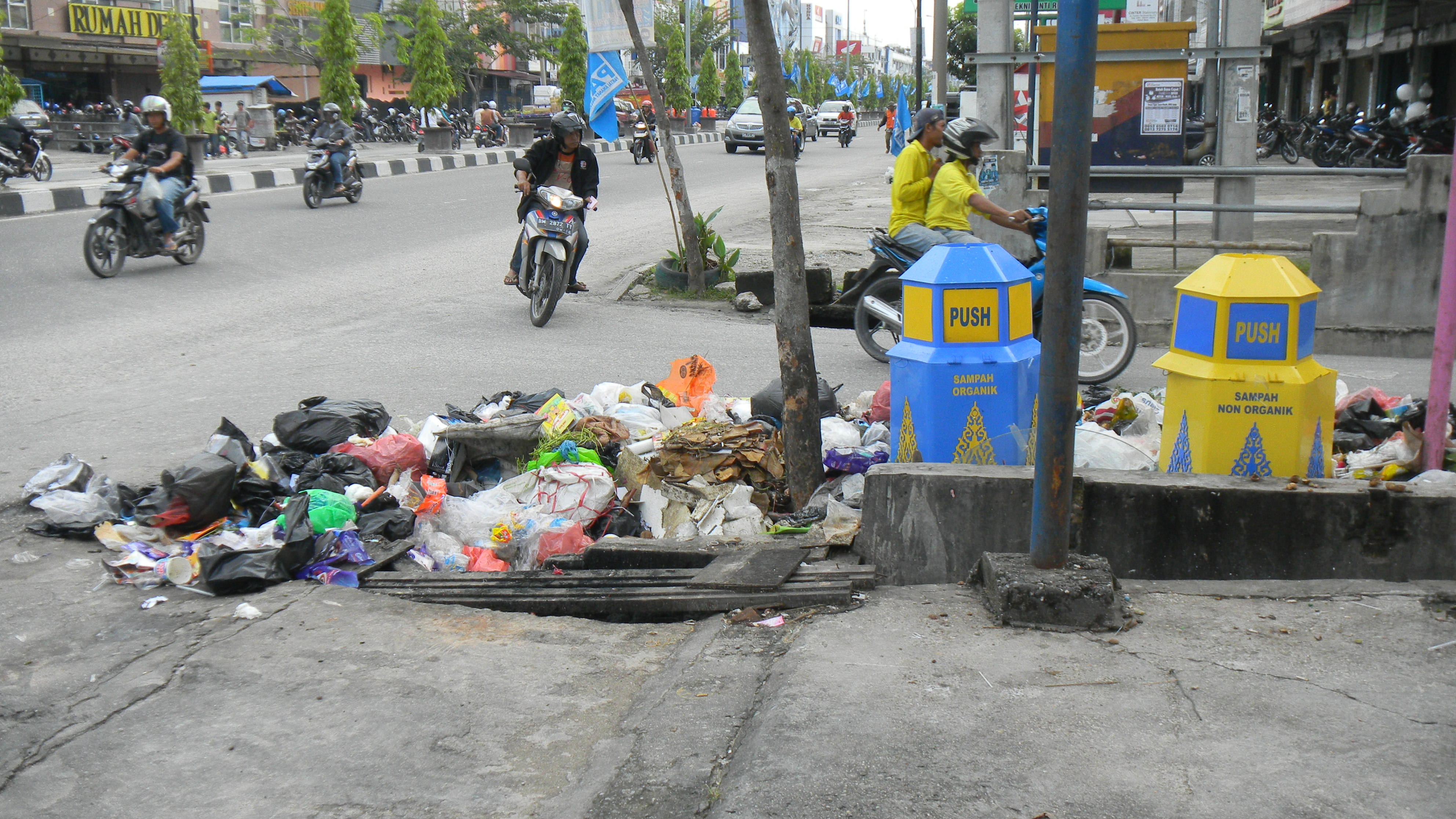 Sampah di simpang Jalan Gabus dan Jalan Tuanku Tambusai Pekanbaru Riau